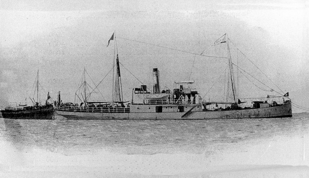 Der Küstendampfer Adjutant der DOAL 1900